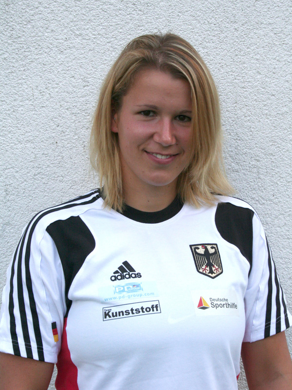 Deutsche Kanu-Rennsportlerin und Europameisterin im Einer-Kajak über 1.000m